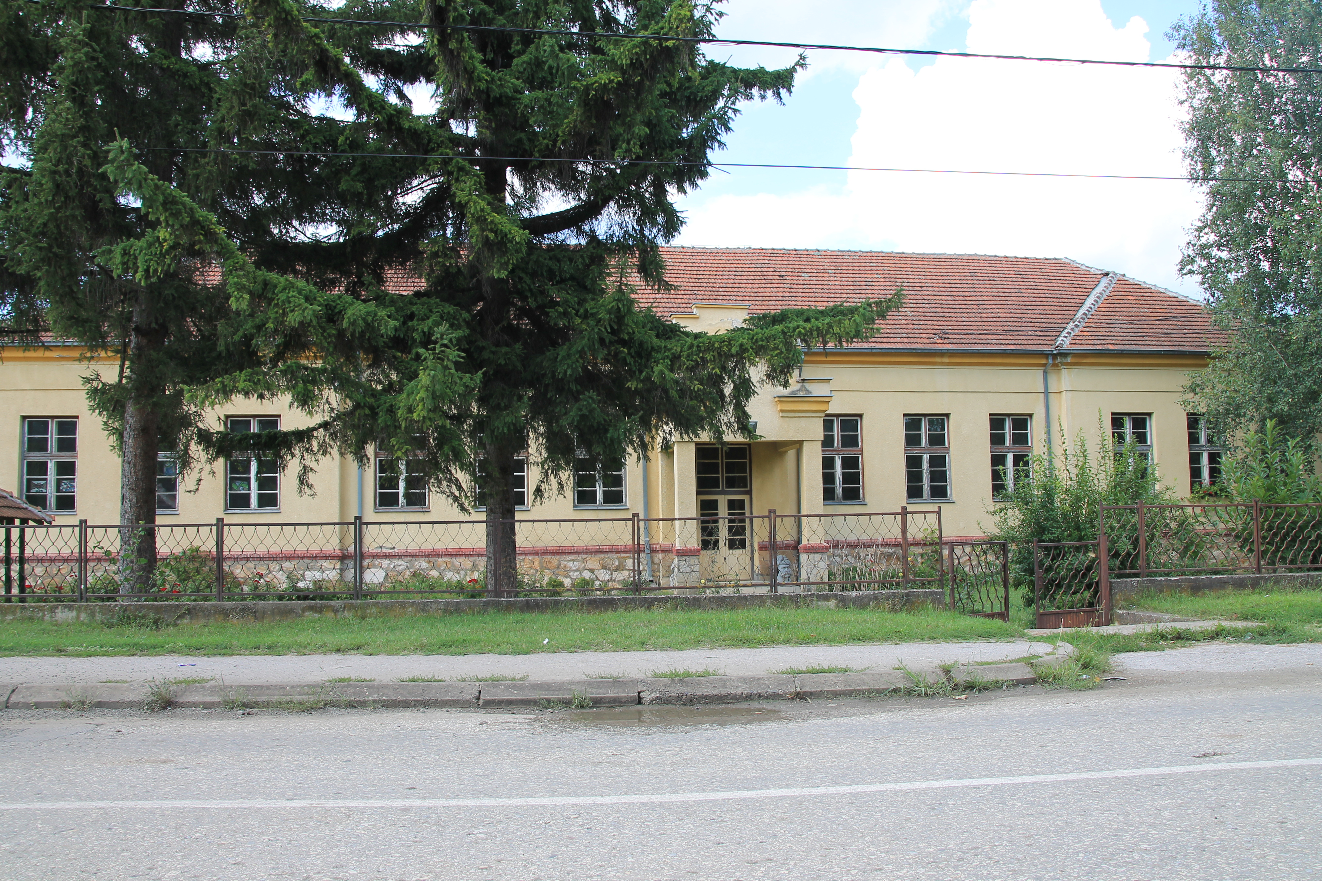 Škola u Opariću